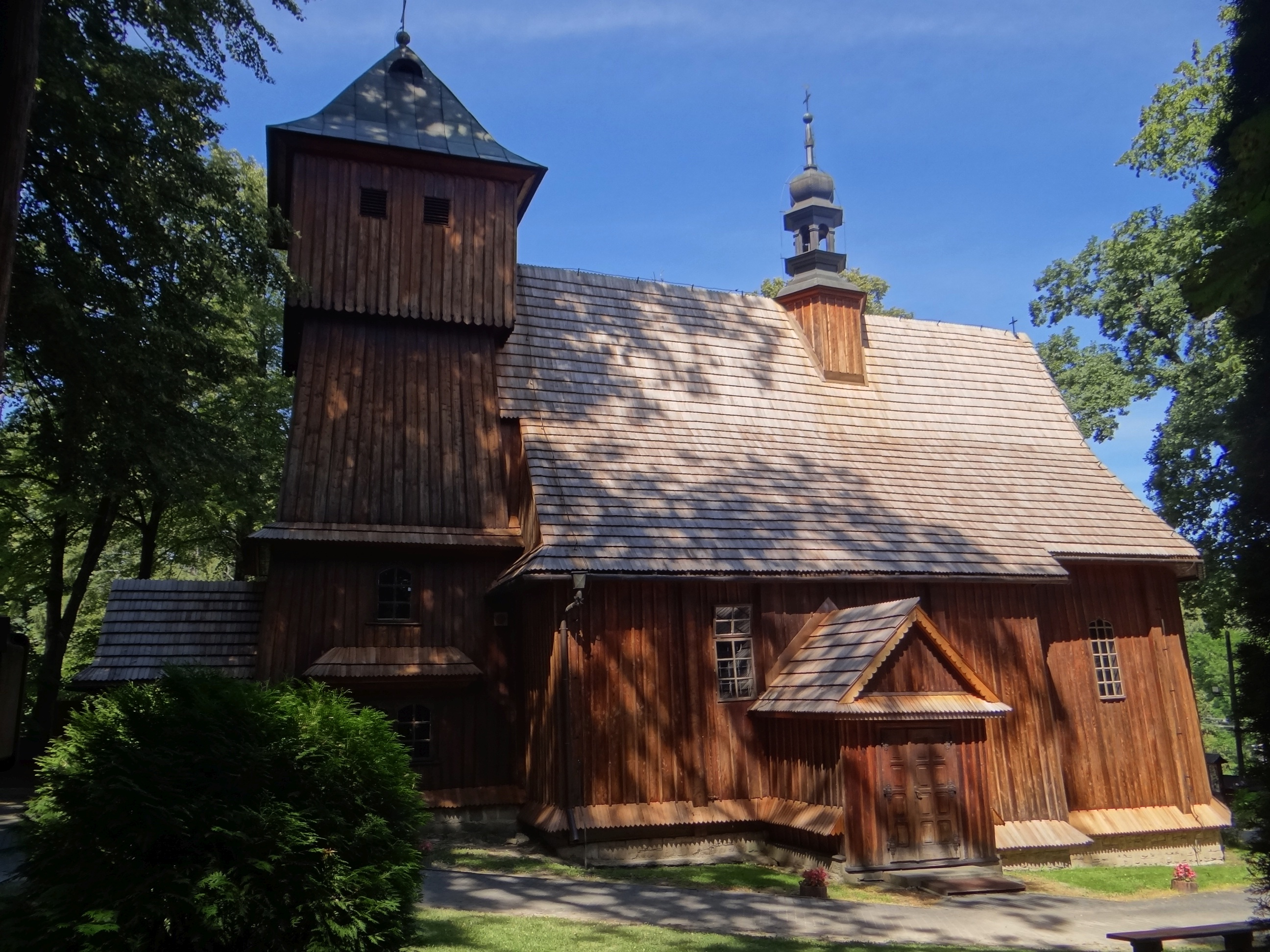 Gruszów (powiat myślenicki). Kościół